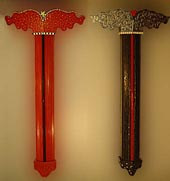 Bildet forestiller Liv Mildrid Gjernes' gave bestilt av den norske regjeringen til Märtha Louise' og Ari Behns bryllupp og er tatt av Robert E. Haraldsen. ©2002 Profero. Lastet opp med tillatelse. Orig. photo: Liv_Mildrid_Gjernes_Hjerteikoner-DSC00047-sm.jpg